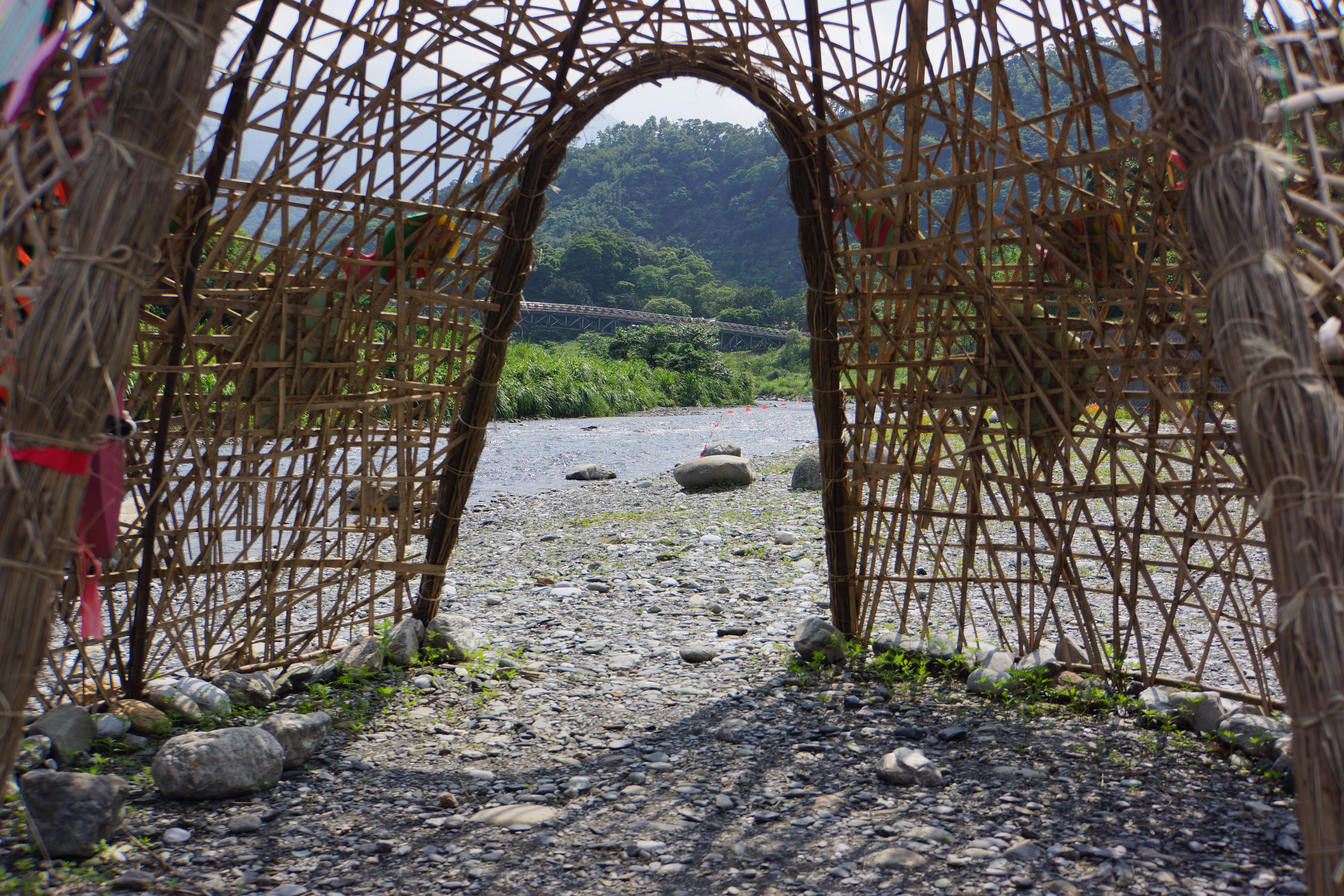 Xincheng River 新城溪